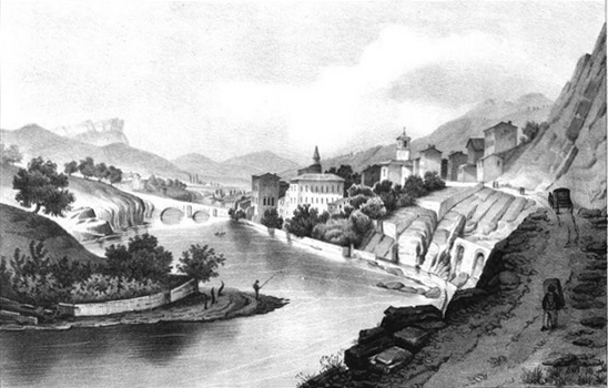 Saillans